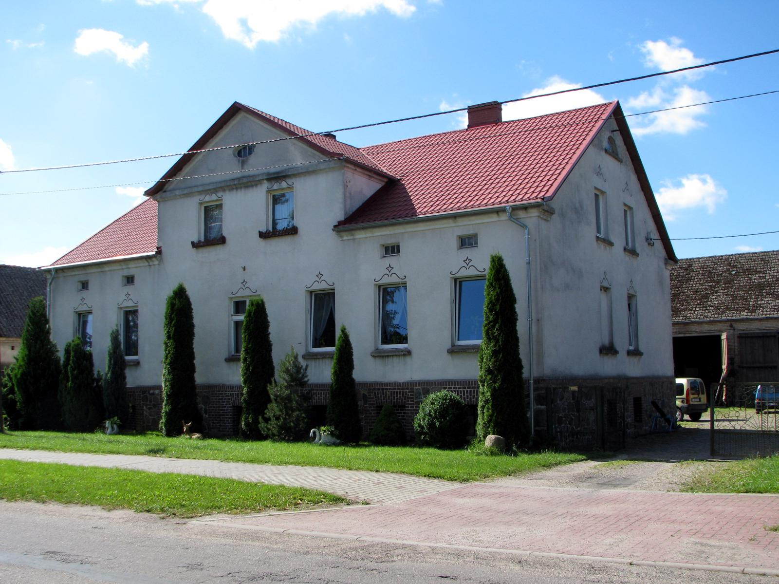 Wojcieszyce. Zabytkowy dom przy ul. Wspólnej